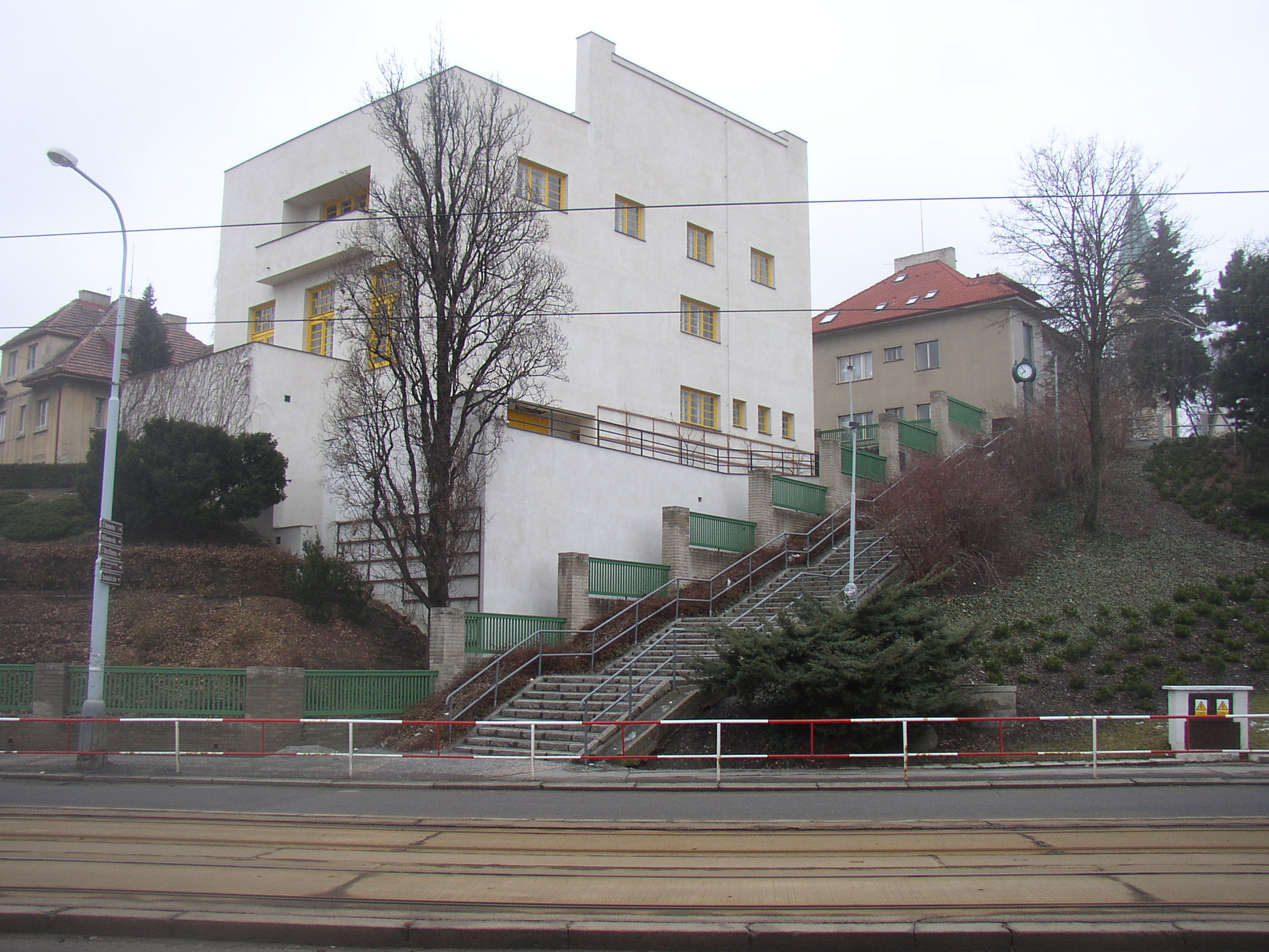 Müllerova vila od Adolfa Loose v Praze-Střešovicích. Pohled od S.